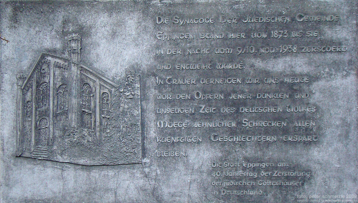 Synagogengedenkstein am Platz der neuen Synagoge in Eppingen